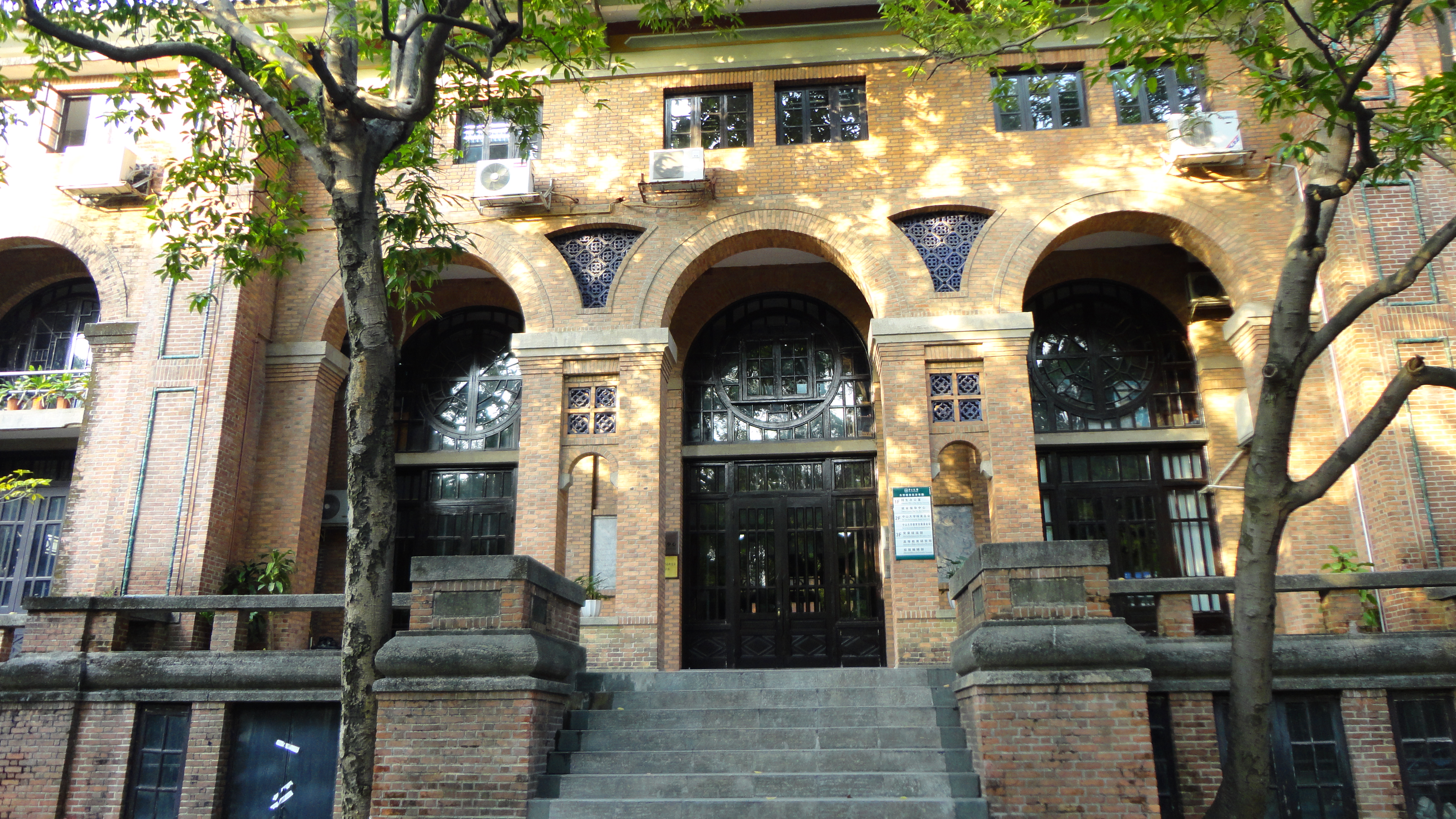 格蘭堂，嶺南大學建築，被中山大學佔用後，大門前的燈座剩餘底部，原有的英文被鑿去，燈座上半部分也不存。大門玻璃上的的「GH」窗花被拆下。